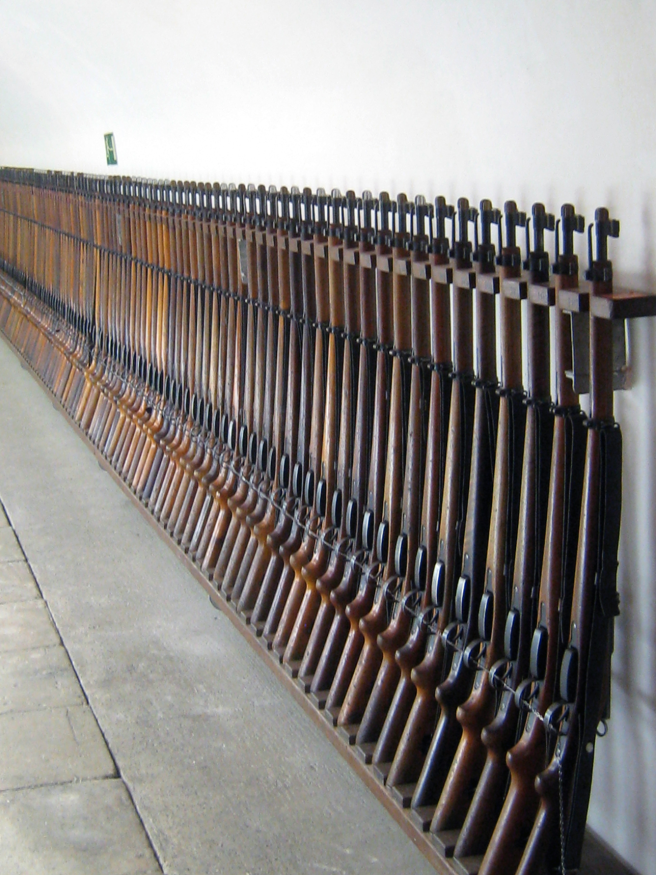 Gewehrrechen mit Karabiner 31 im Festungsmuseum Reuenthal